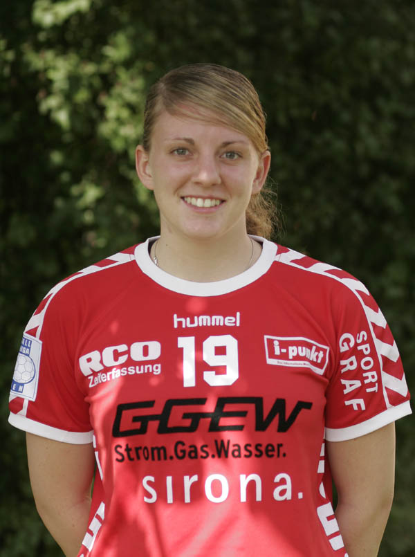 Claudia Schückler, Handballspielerin von Bayer Leverkusen, zuvor HSG Bensheim/Auerbach am 2. September 2006 in Bensheim vor der Weststadthalle aufgenommen.